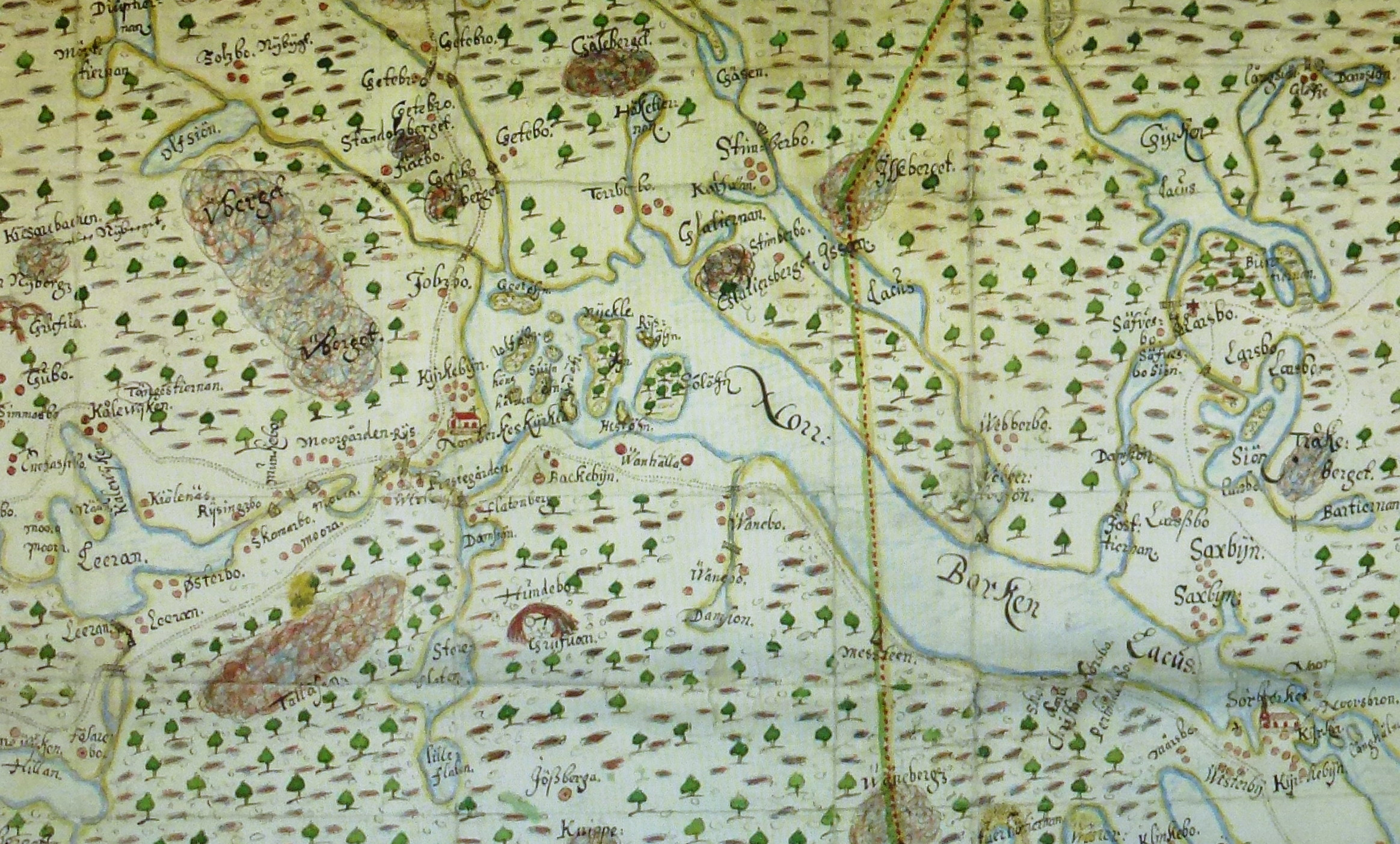 Smedjebacken med Norra Barken och omgivningar